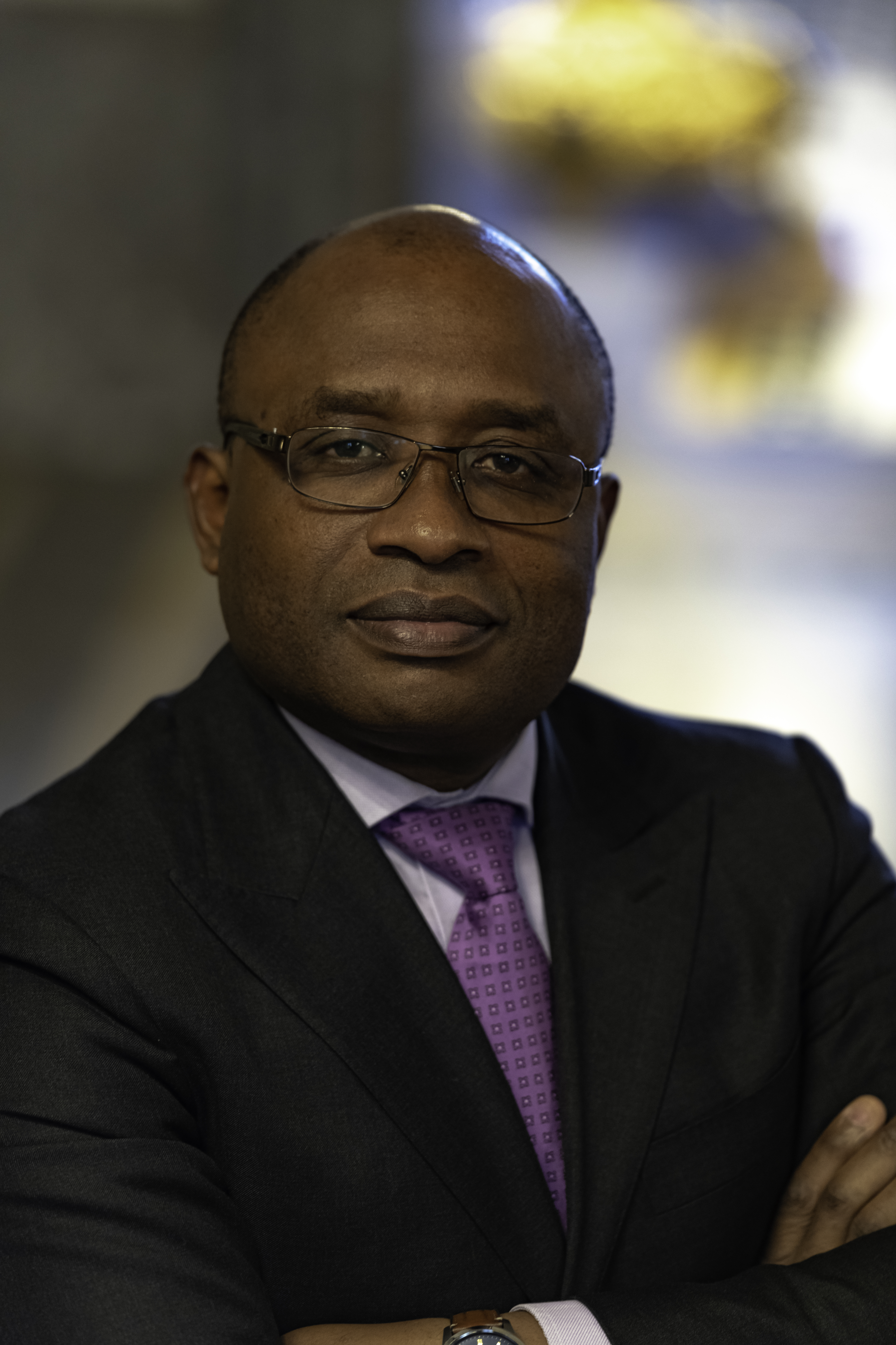 Diplomate bilingue chevronné (ministre plénipotentiaire) et universitaire accompli, M. Maurice Kamga a une expérience de plus de 25 ans dans la pratique et l’enseignement du droit international, en général, et de la justice internationale, en particulier. Ayant consacré une part substantielle de ses travaux de recherche au droit international de la mer, notamment après avoir été désigné, en 1994, neuvième lauréat de la dotation onusienne Hamilton S. Amerasinghe pour le droit de la mer, il a pu acquérir une expertise désormais confirmée dans ce domaine très technique du droit international, particulièrement en ce qui concerne la délimitation des frontières maritimes. Ses fonctions actuelles de Secrétaire de la Cour internationale de Justice, où il travaille depuis une douzaine années, sont pour lui l’occasion de mettre cette expertise en pratique.